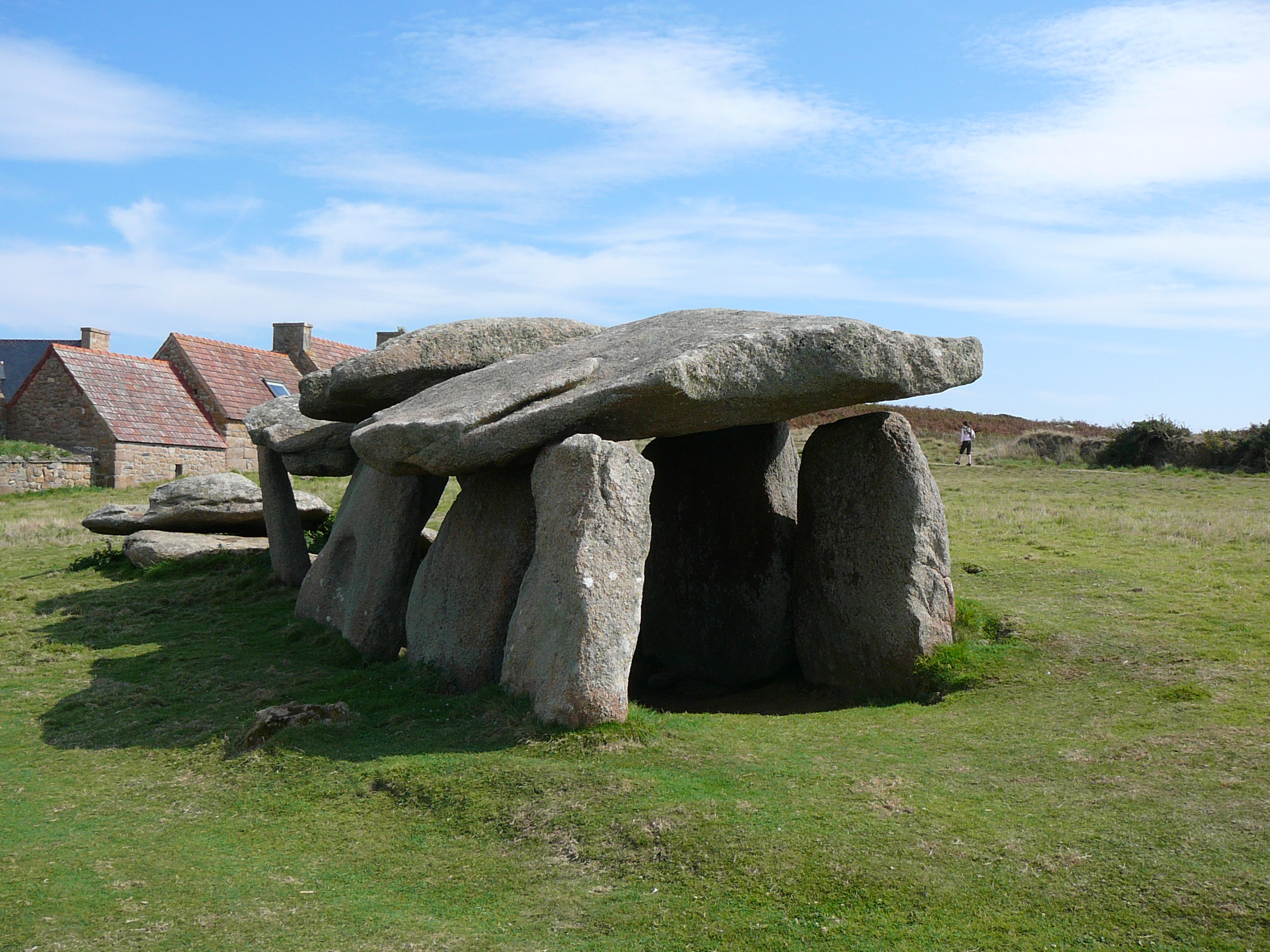 Allée couverte Ile Milliau vue nord (Trebeurden) .